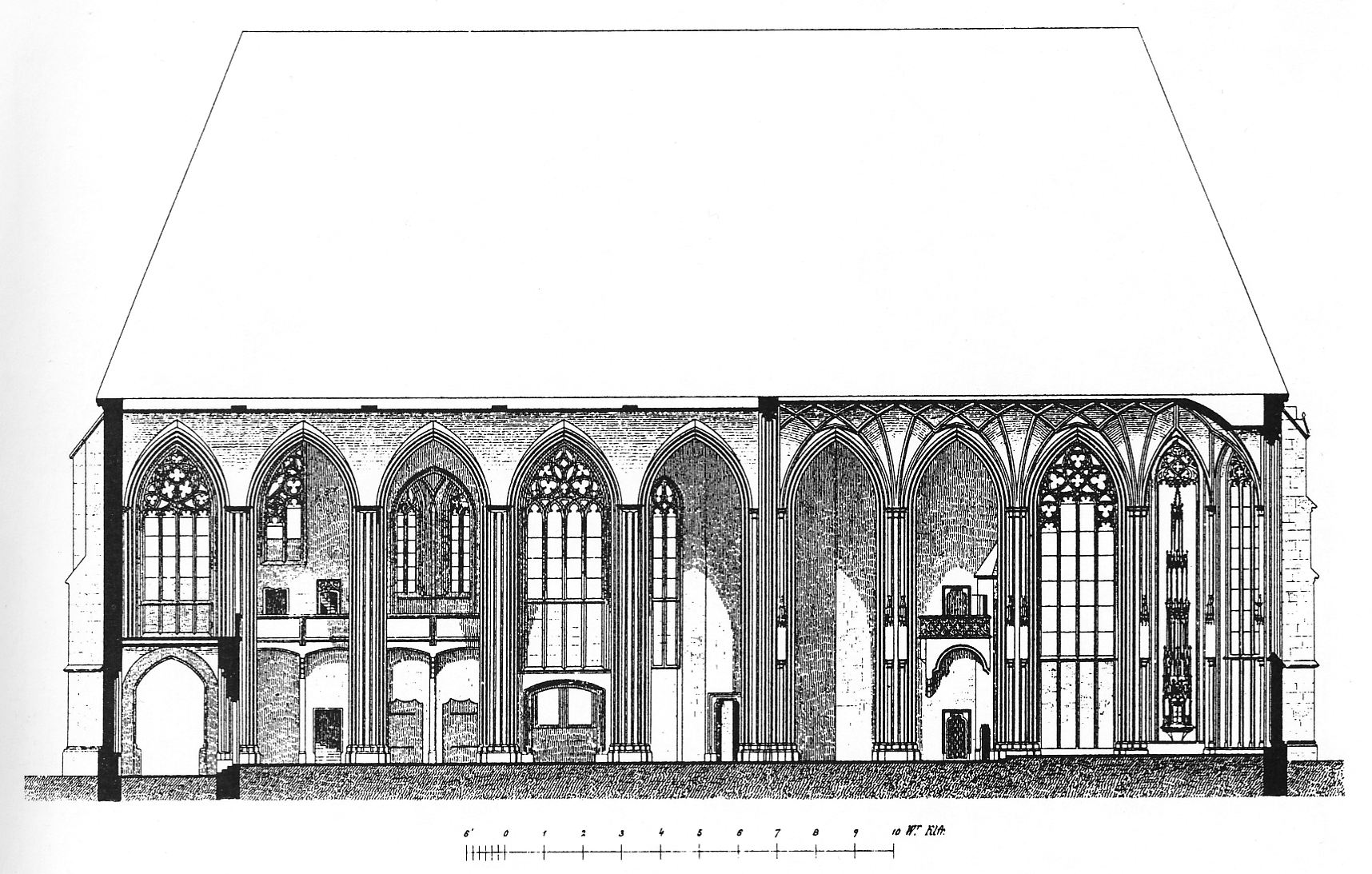 Längsschnitt der Steyrer Stadtpfarrkirche nach Hermann von Riewel